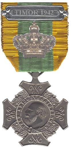 De Eervolle Vermelding in een dagorder was een hoge onderscheiding voor dapperheid.